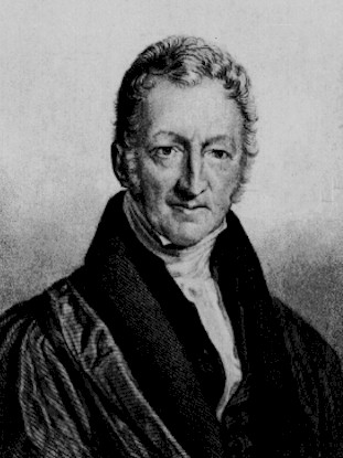 sujet: Thomas Malthus license